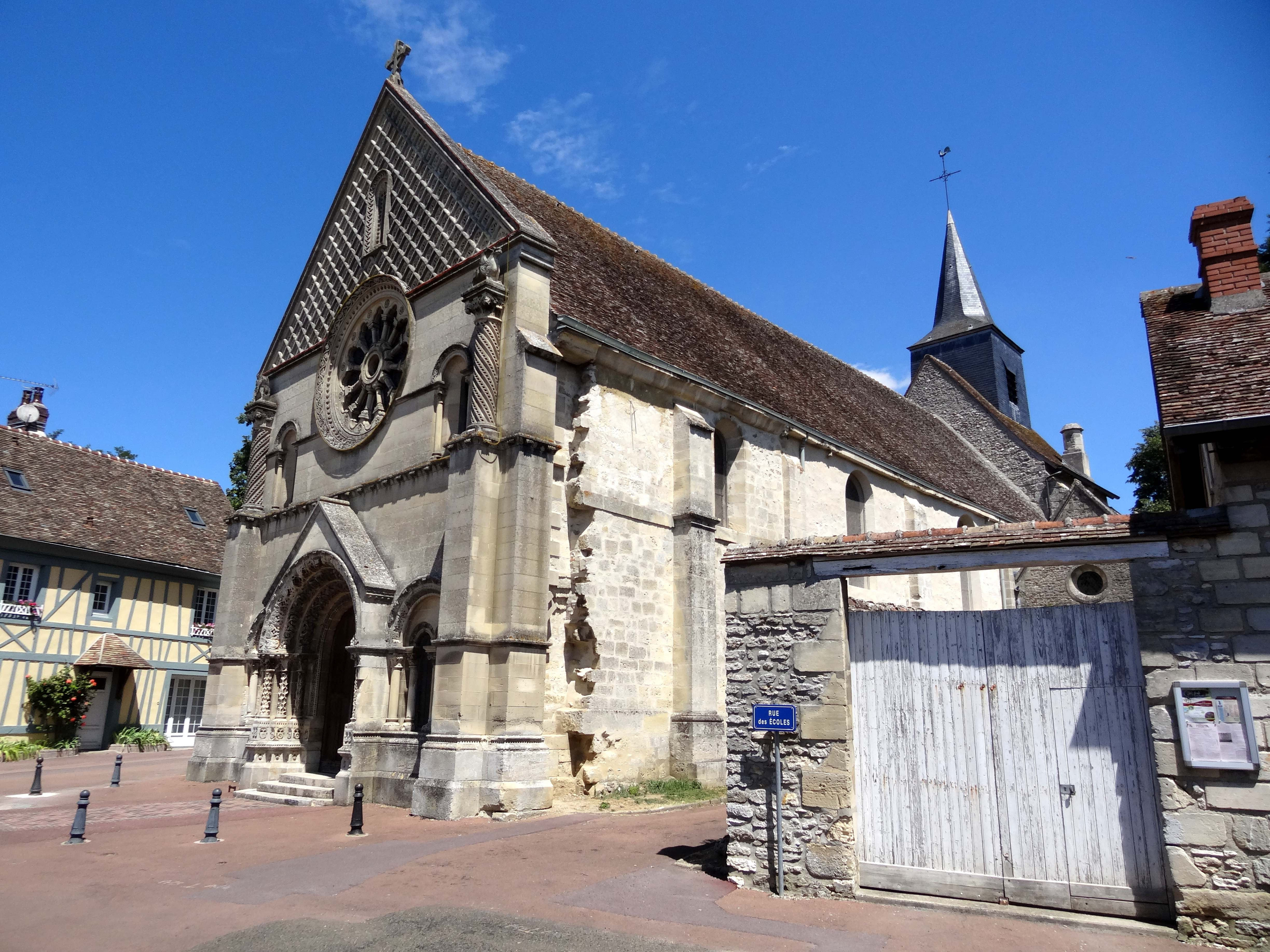 Église Sainte-Madeleine de Trie-Château - voir titre.